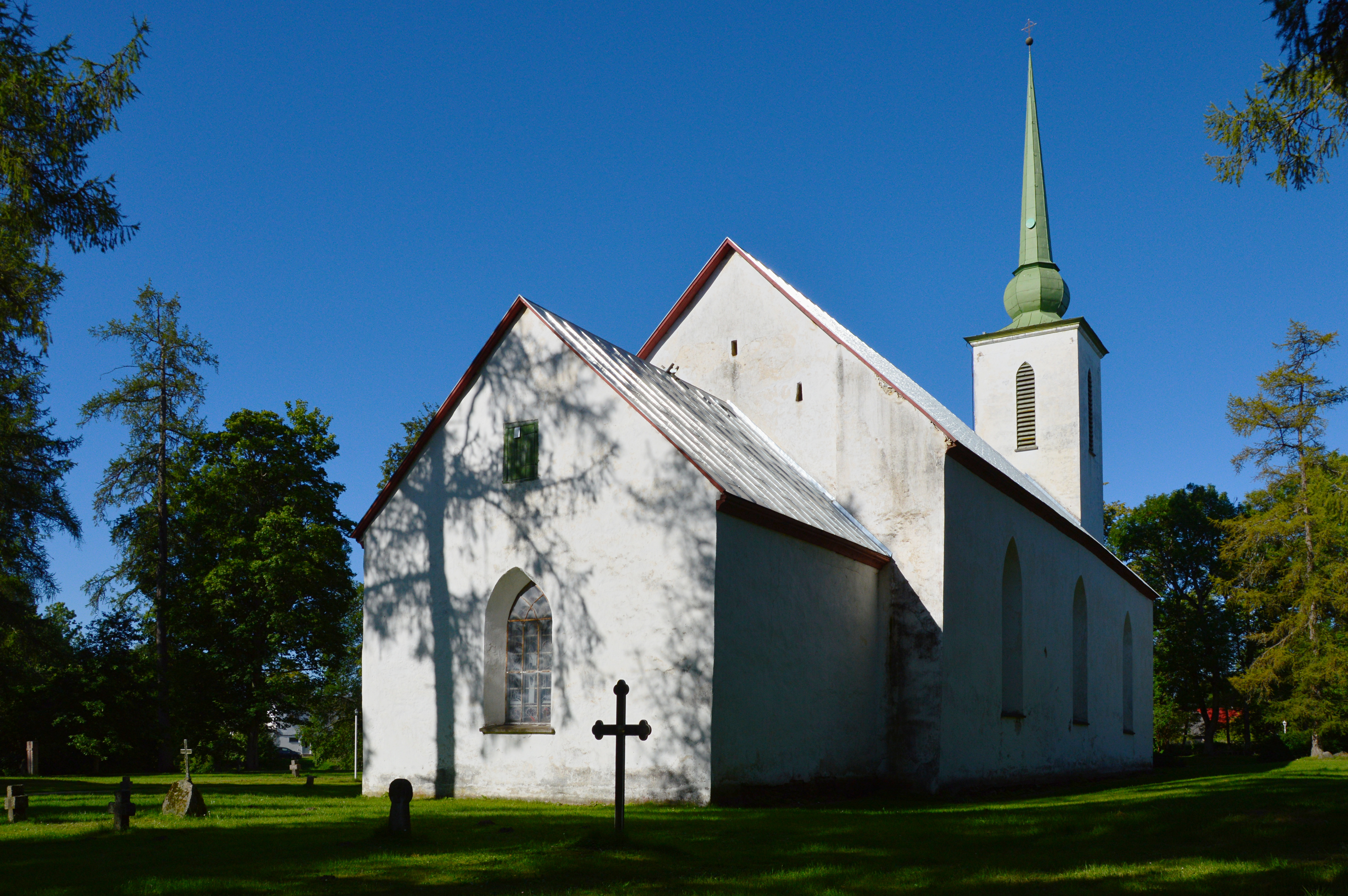 Vigala Maarja kirik.